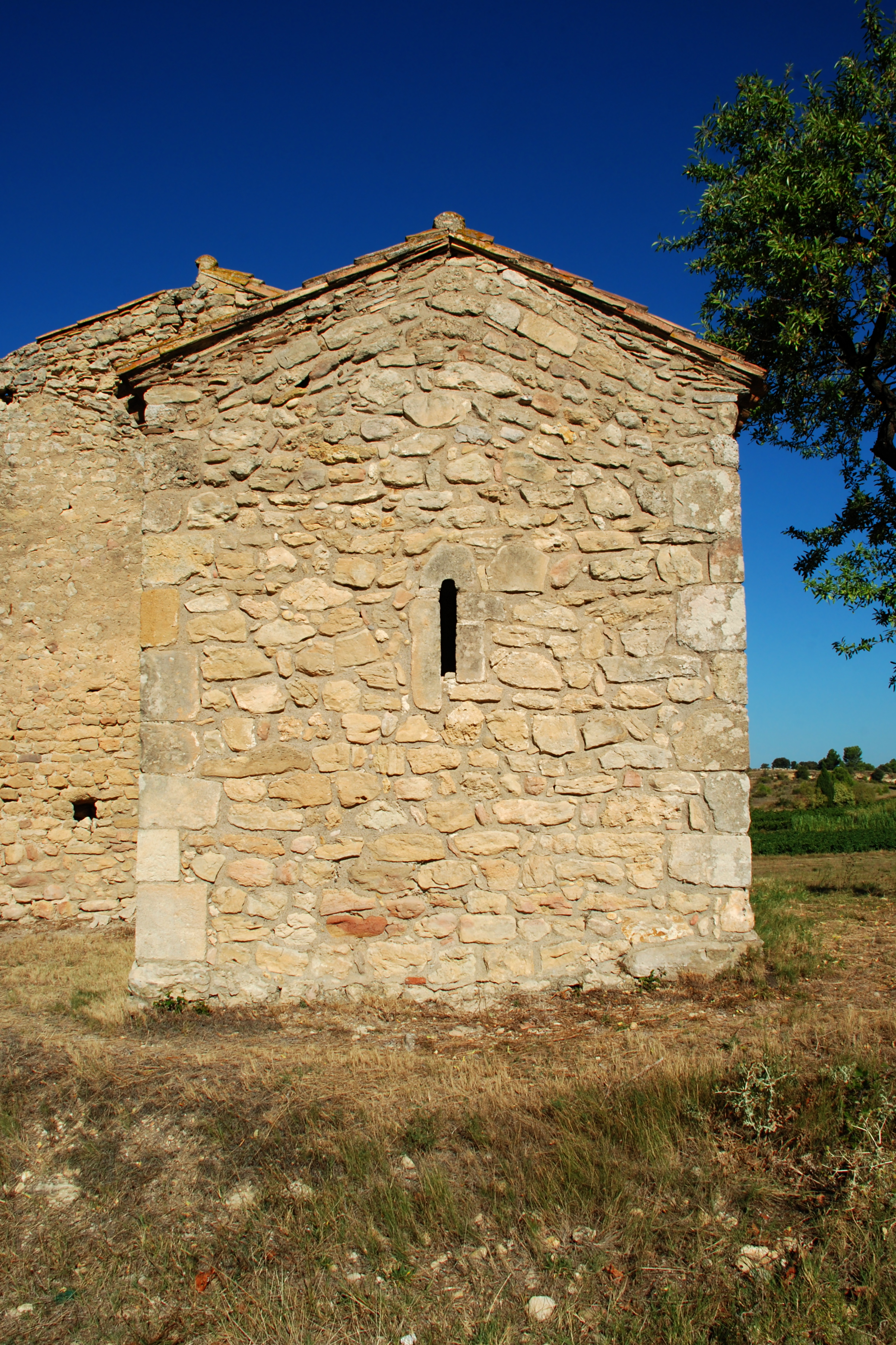 France - Languedoc - Aude - Moussan - chapelle Saint-Laurent (préroman) - chevet carré .